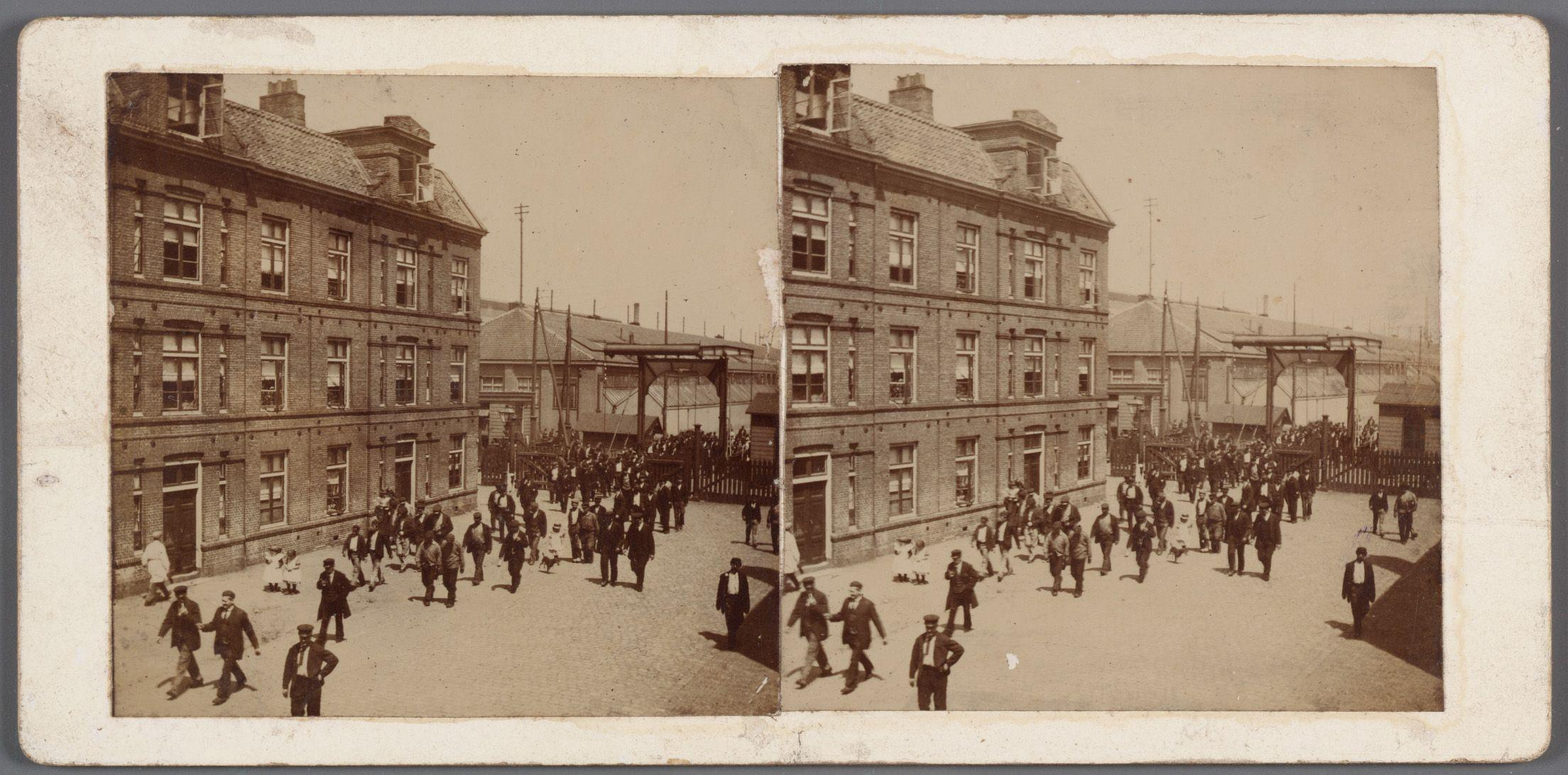 Beschrijving Oostenburger Middenstraat 85-89, gezien naar de brug over de Oostenburgerdwarsvaart Documenttype foto Vervaardiger Benschop, Maarten Collectie Collectie Stadsarchief Amsterdam: stereofoto's Datering 1898 ca. t/m 1910 ca. Geografische naam Oostenburgermiddenstraat Inventarissen Afbeeldingsbestand 010007000665 Generated with Dememorixer